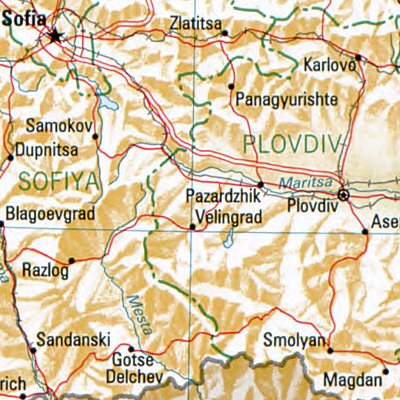 Pasardschik - Lage des Ortes in Bulgarien